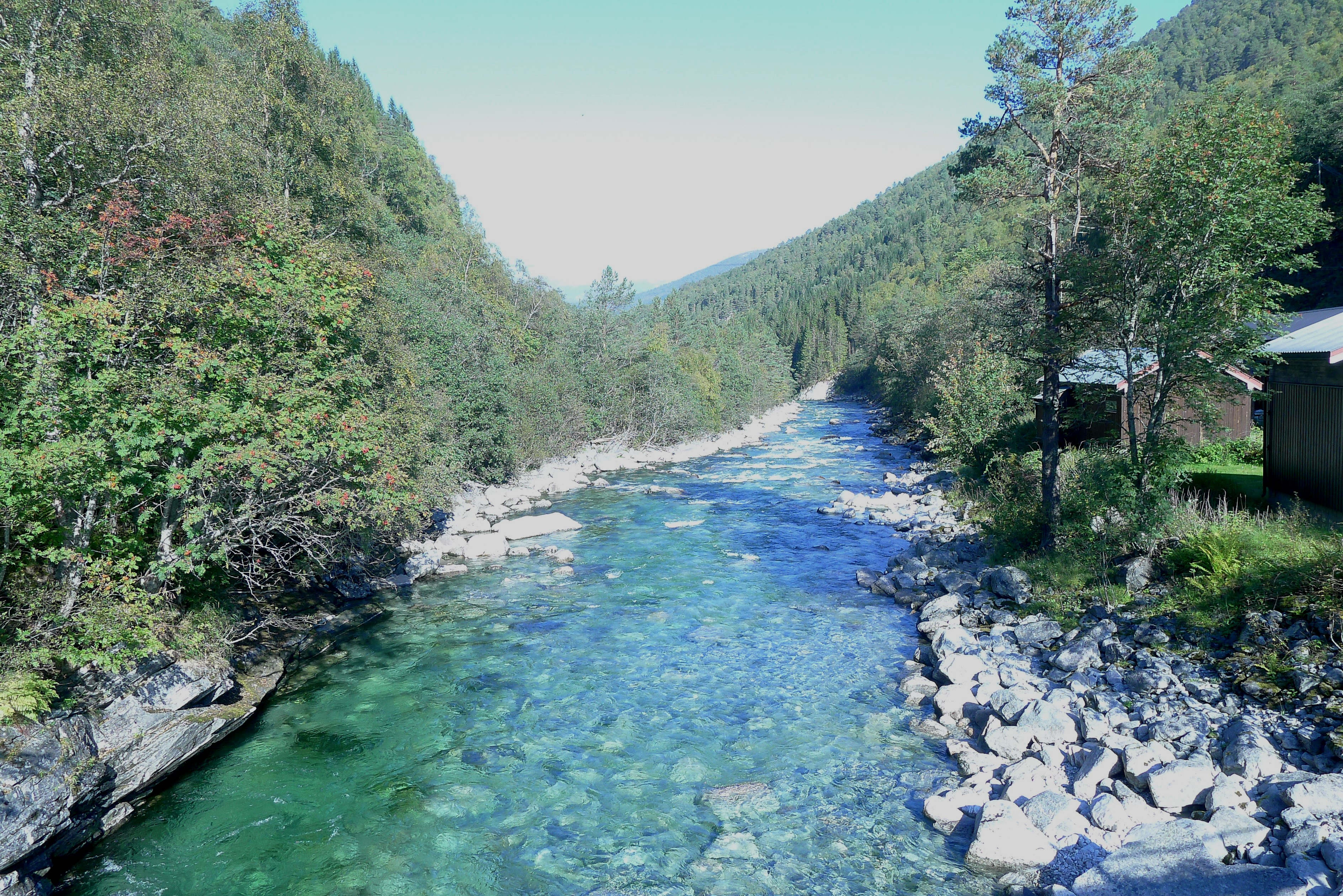 Grøvu mot nordøst